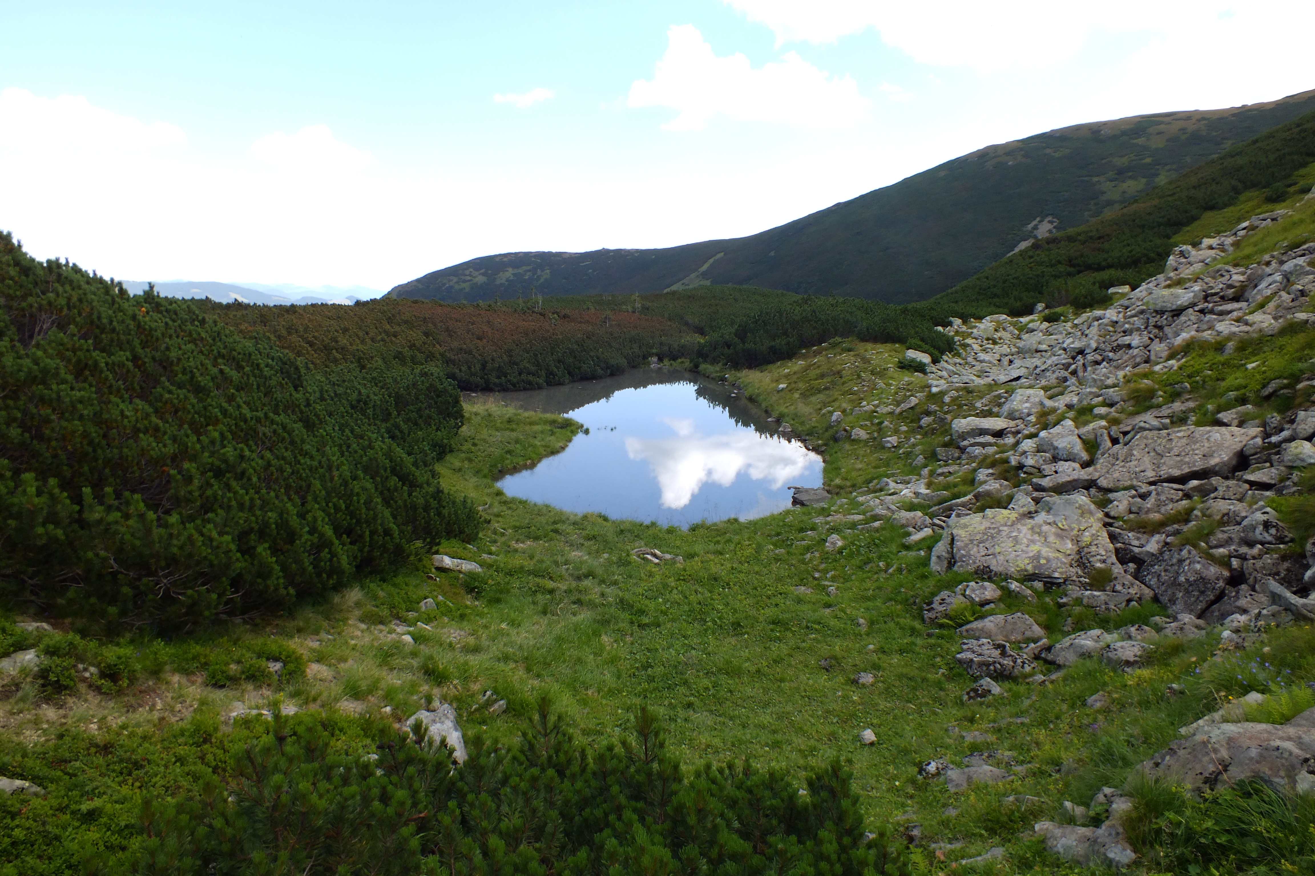 Озерце плоске - загальний вид з заходу. З південного берега існує кам'яна гряда, що наче відділяє озерце від кам'яного осипища.